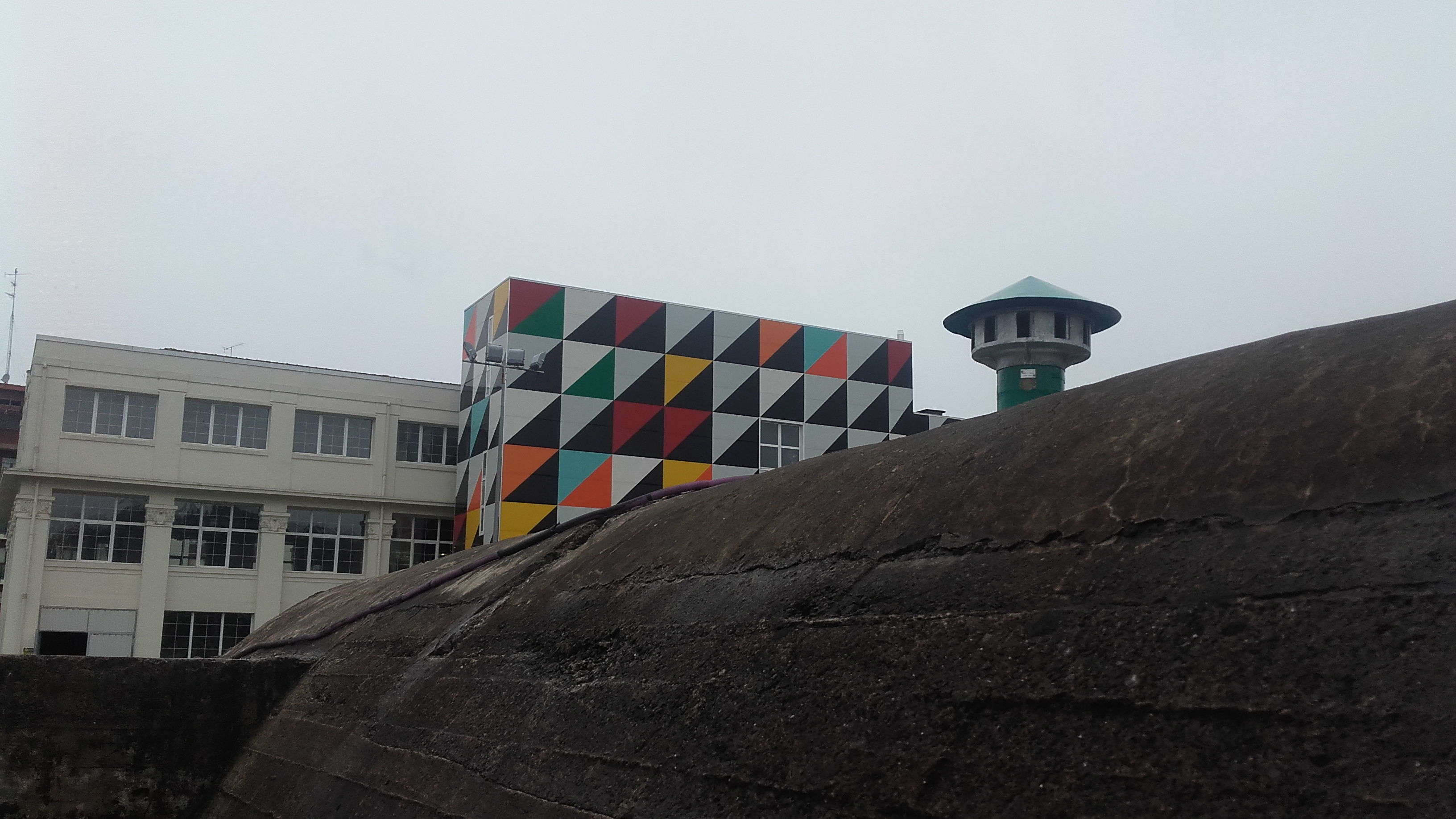 La sirena d'Astra, sobre la coberta del refugi antiaeri tipus búnquer de la Guerra Civil, a Guernica. 26 d'abril de 2017 (autor: Genís Ribé / Museu d'Història de Sabadell).